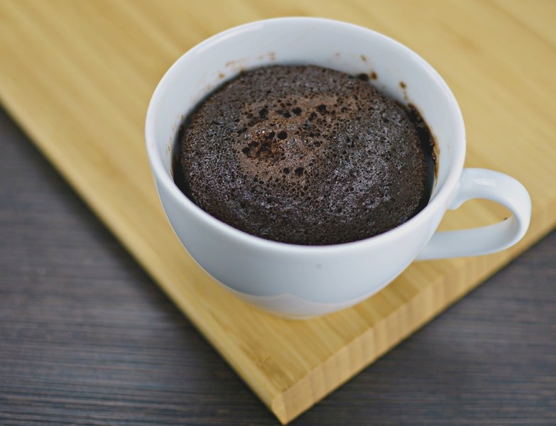 Tassenkuchen Schokolade